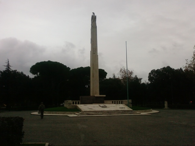 I Giardini Pubblici di Latina con il Monumento ai Caduti